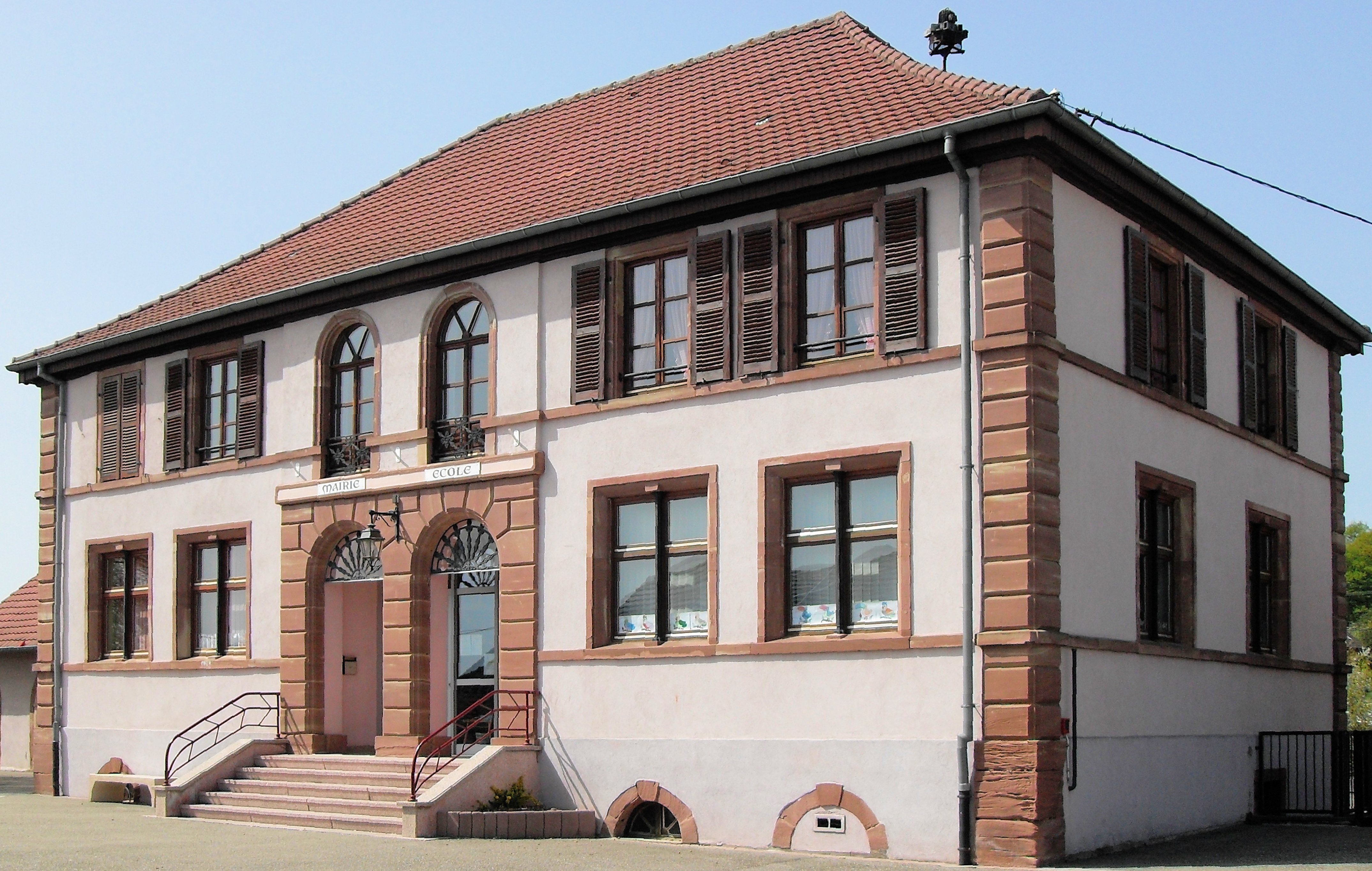 La mairie-école de Traubach-le-Haut